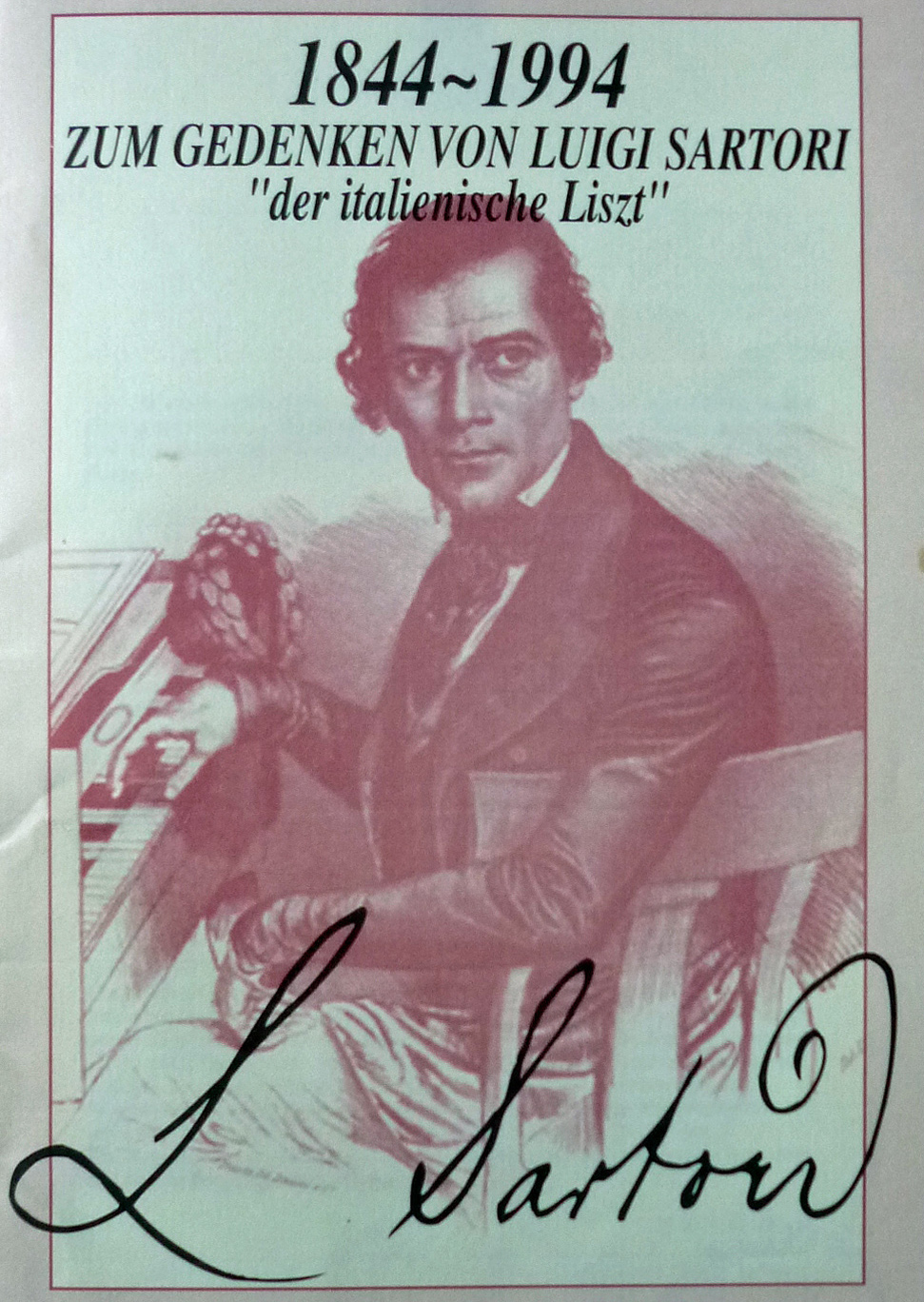 Luigi Sartori - Titelblatt des Konzertprogramms mit dem Chor "Luigi Sartori" aus Spresiano vom 7. August 1994 in der Katholischen Hofkirche in Dresden zum Gedenken an den italienischen Pianisten und Komponisten Luigi Sartori (1817–1844), der in Dresden verstorben ist.